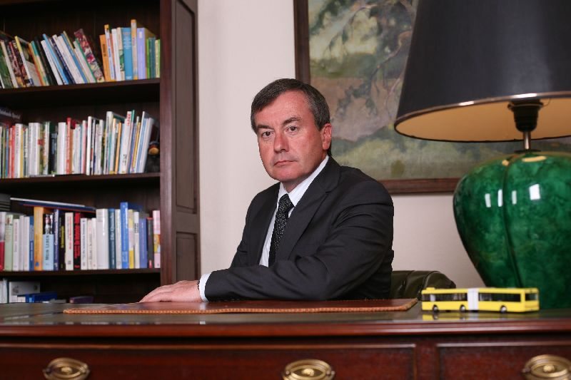 Inż. Krzysztof Olszewski, manager.